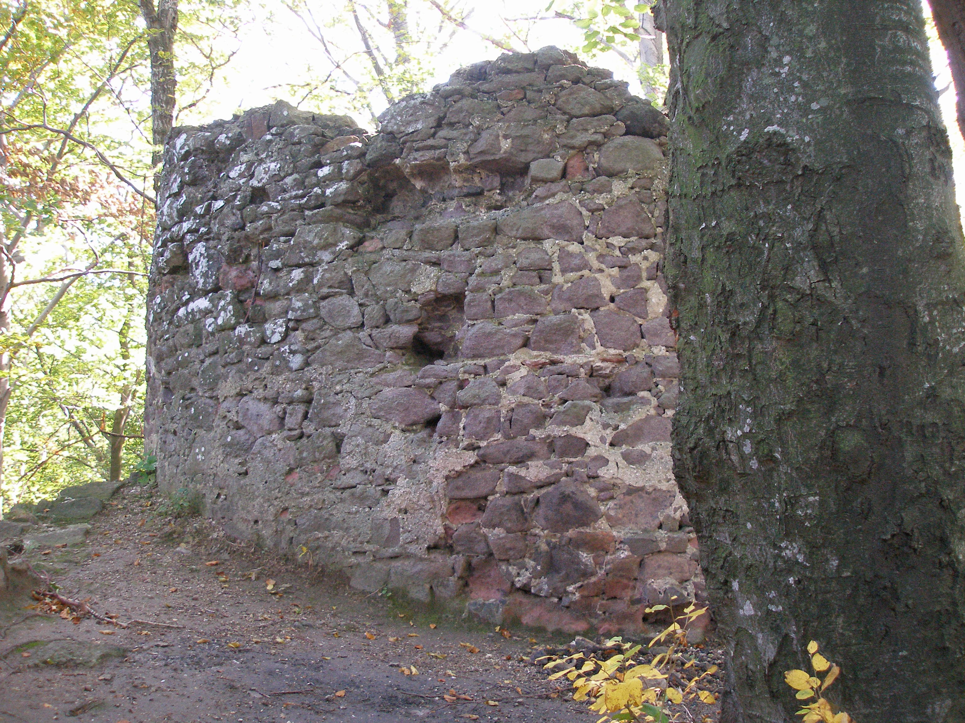 Štátna prírodná rezervácia Zbojnícky zámok nad obcou Ruská Nová Ves, okres Prešov, región Šariš.